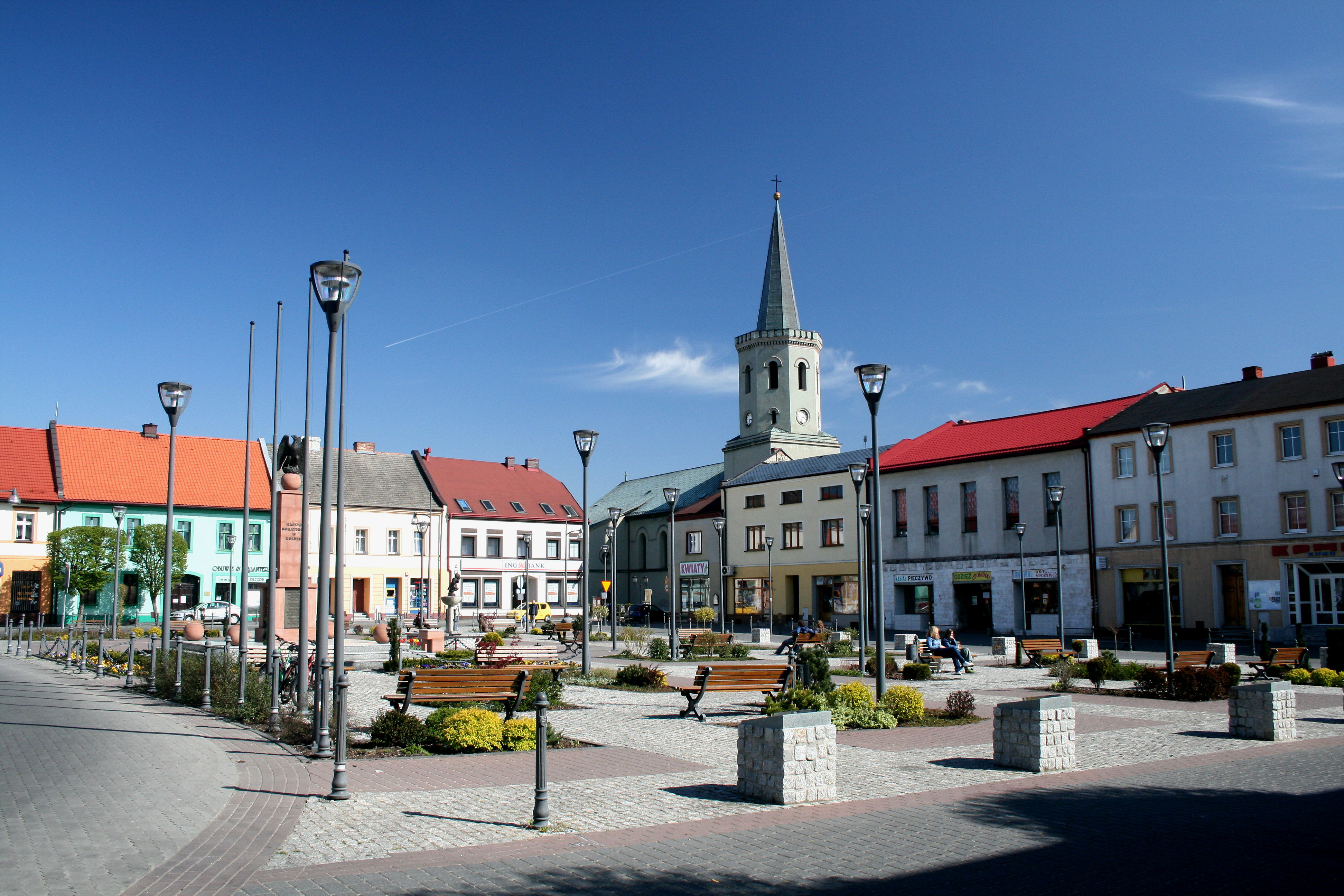 Bieruń Stary, miasto w ramach historycznego założenia